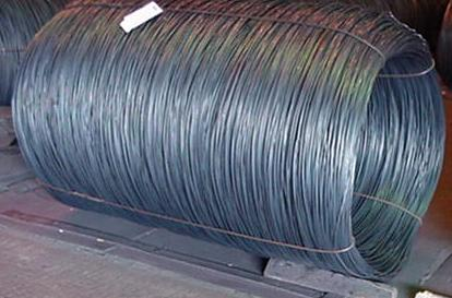 Rollo de Alambre Laminado de 8 de diametro